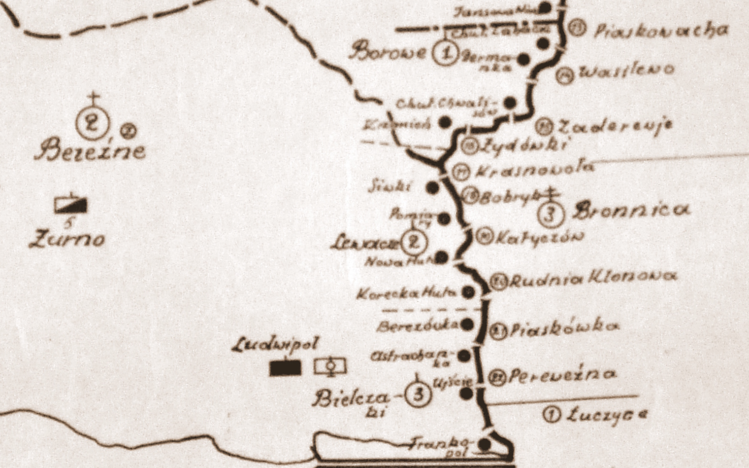 Szkic rozmieszczenia batalionu KOP Bereźne w 1931